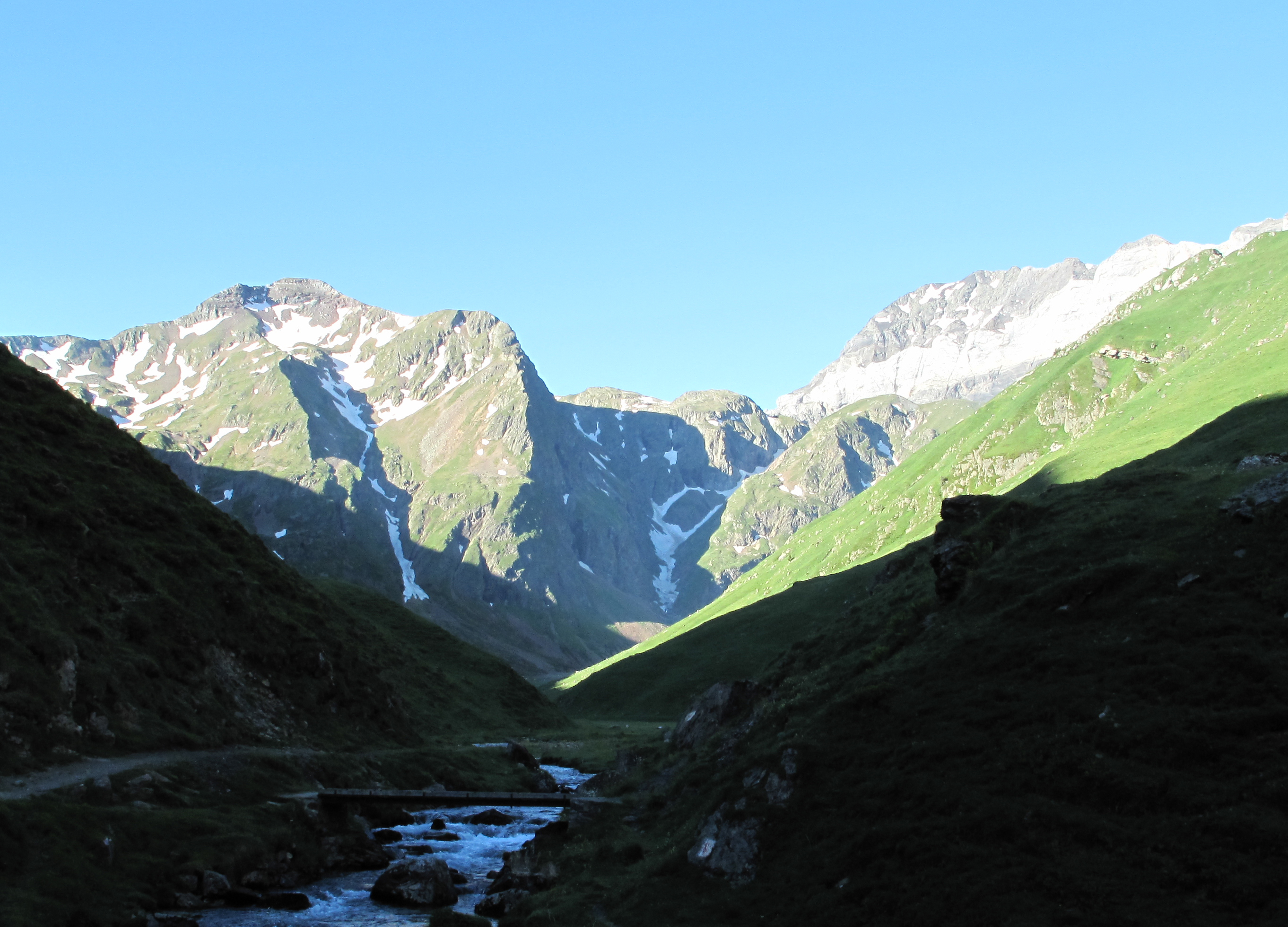 Depuis l'extrémité nord du grand replat de la vallée de La Gela, vue vers l'amont sur les grands pâturages de la vallée, avec en toile de fond un décor rocheux sous le soleil matinal, constitué par le Pic de Port Vieux à gauche, l'escarpement dit "le Pichous de Barroude" au milieu, et l'extrémité sud de la muraille de Barroude à droite.